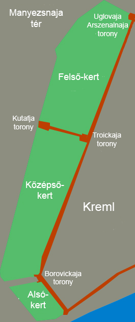 A moszkvai Sándor-kert alaprajza.